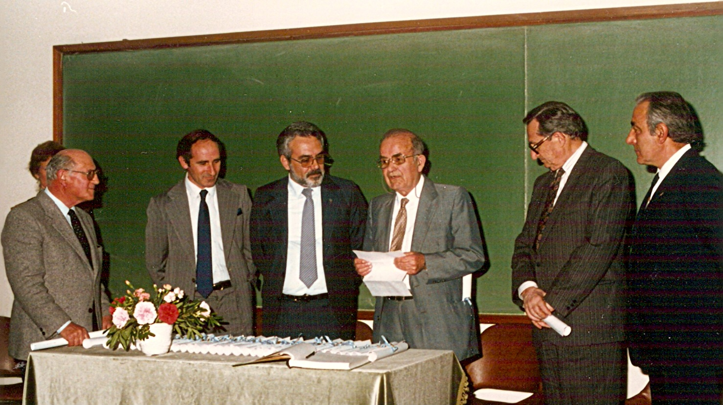 Victorio Angelelli agradeciendo la designación como Doctor Honoris Causa en el aula magna de la Facultad y Museo de la Plata, Argentina.